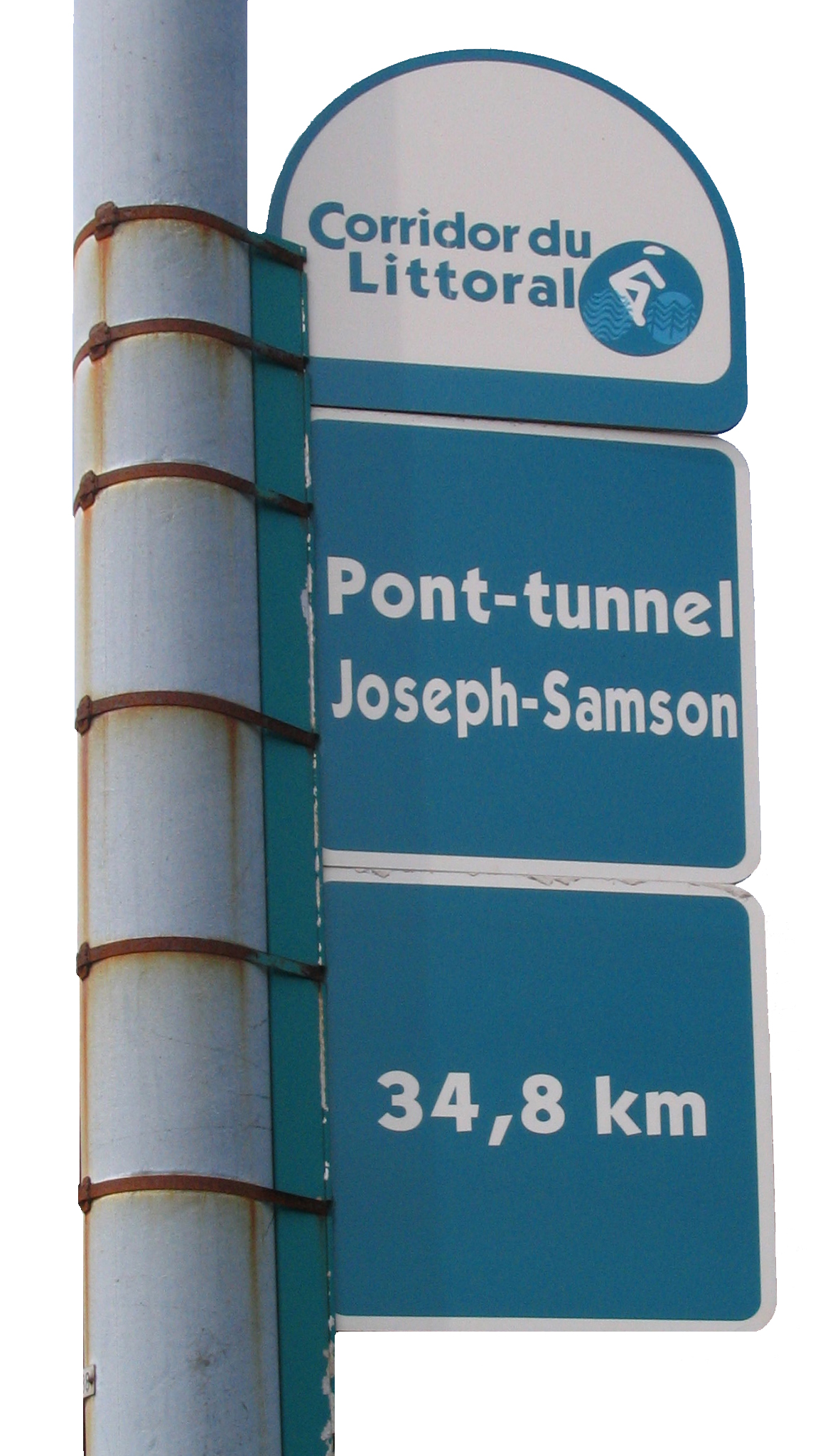 Panneau de la piste cyclable du Corridor du littoral au pont-tunnel Joseph-Samson, qui relie les quartiers de la basse-ville et de Limoilou, à Québec.